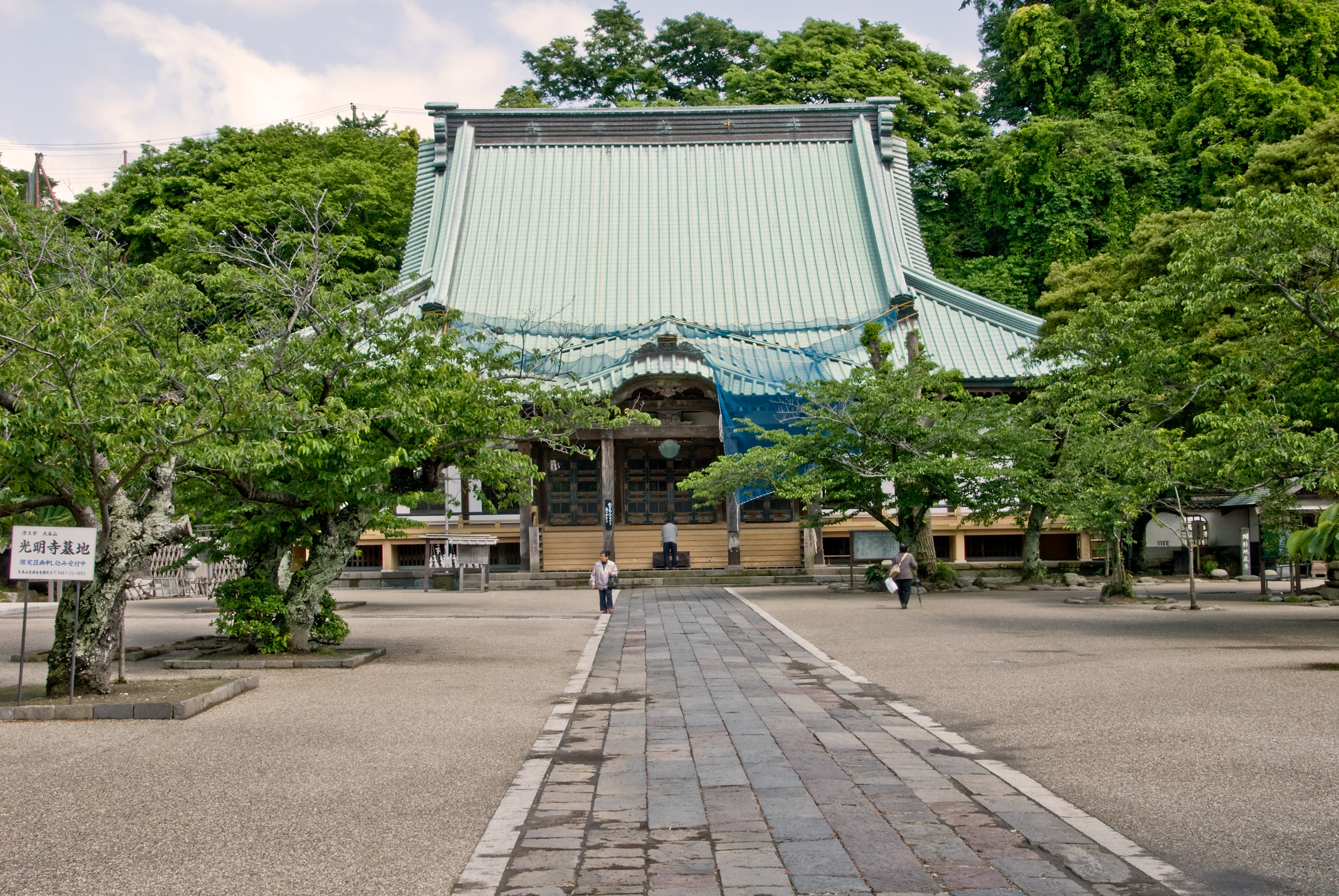 Main Hall, Komyo-ji, Kamakura